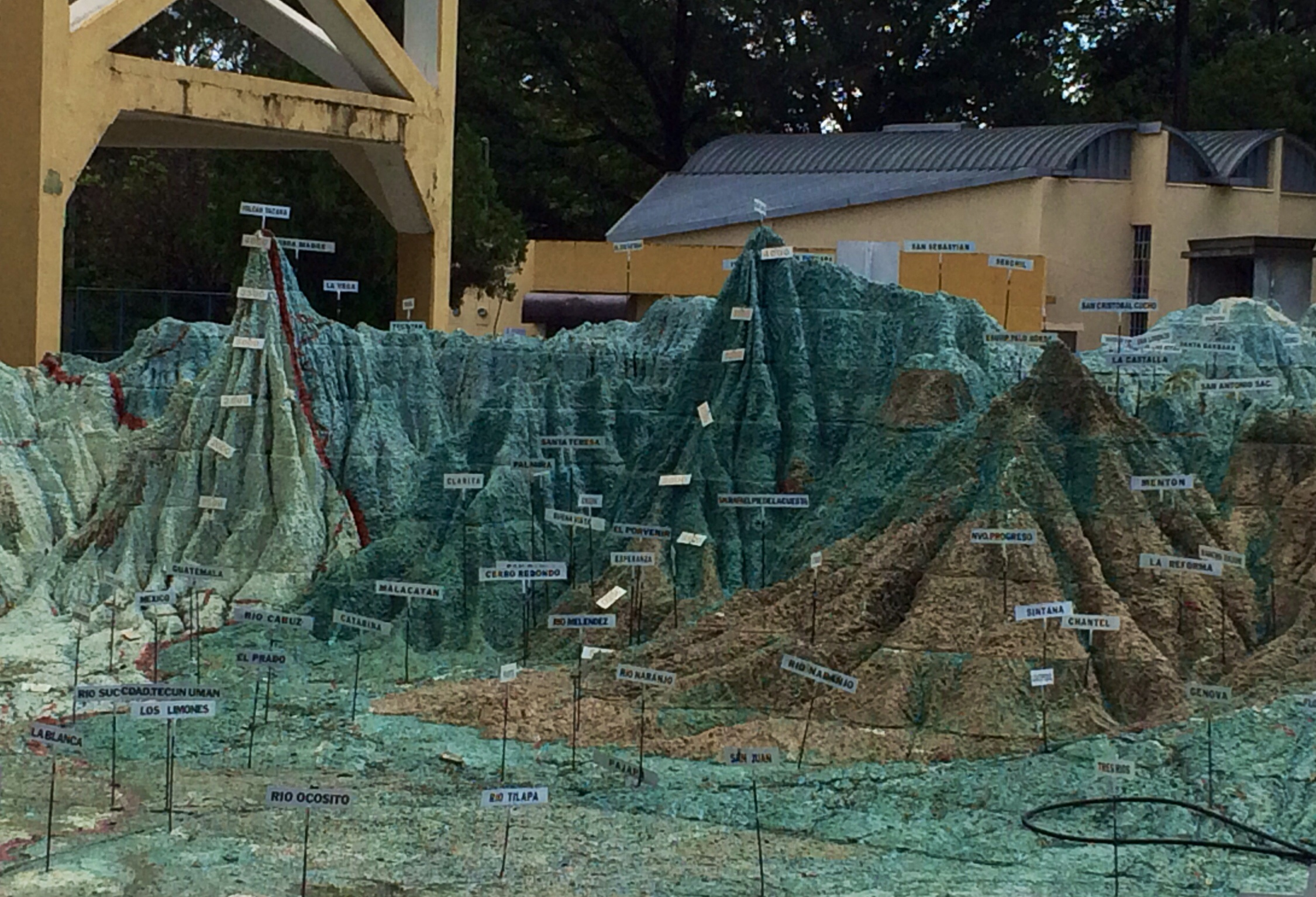 Tacanarelieve